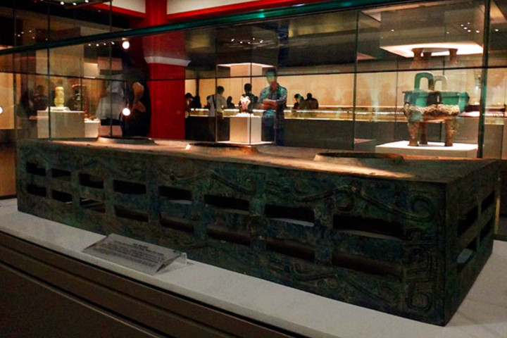 西周 夔纹铜禁，承尊器，拍摄于天津博物馆